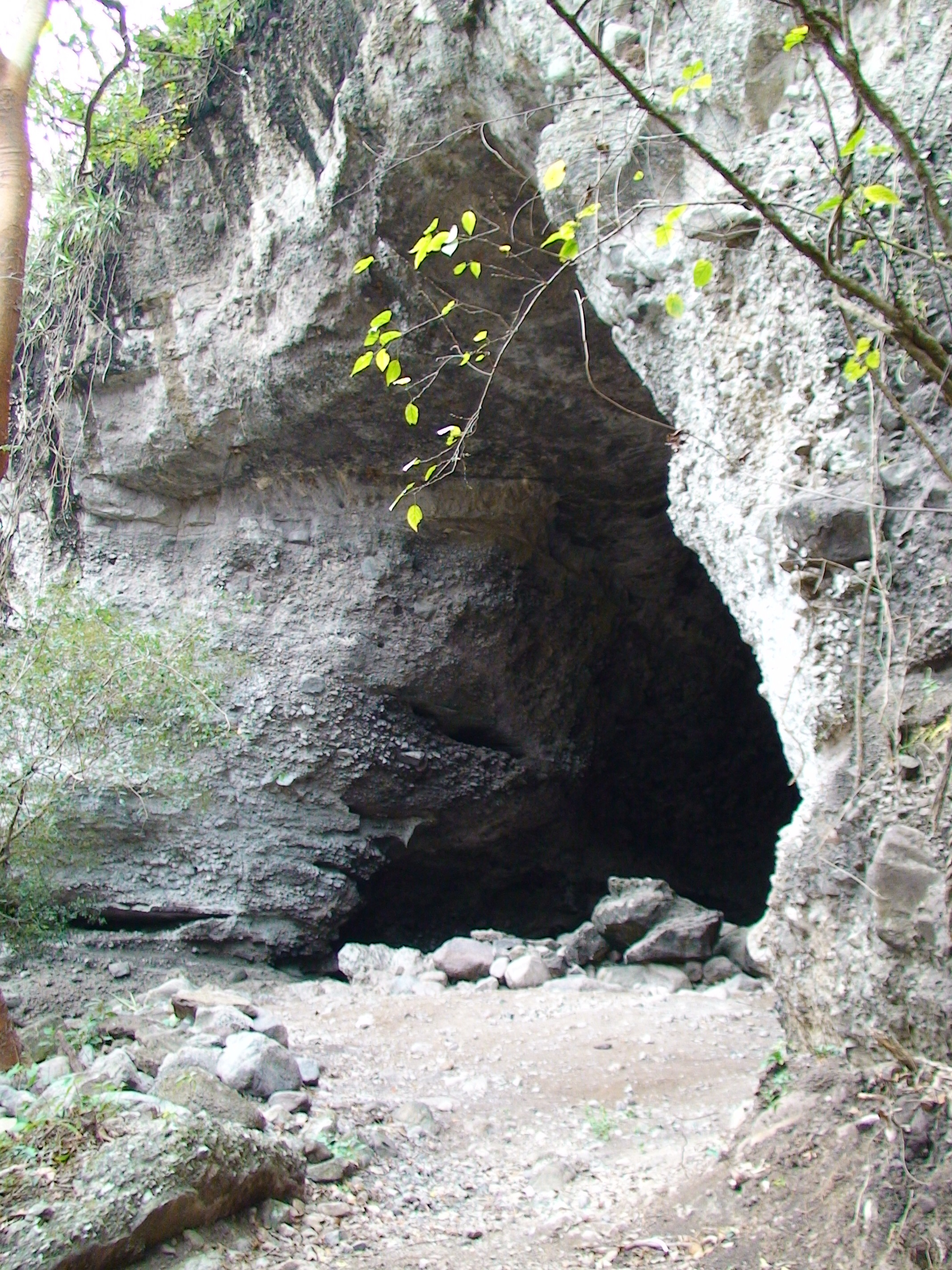 En esta imagen se puede apreciar la belleza natural de La Cueva Santa, lugar que encierra en sus paredes historia y misticismo.